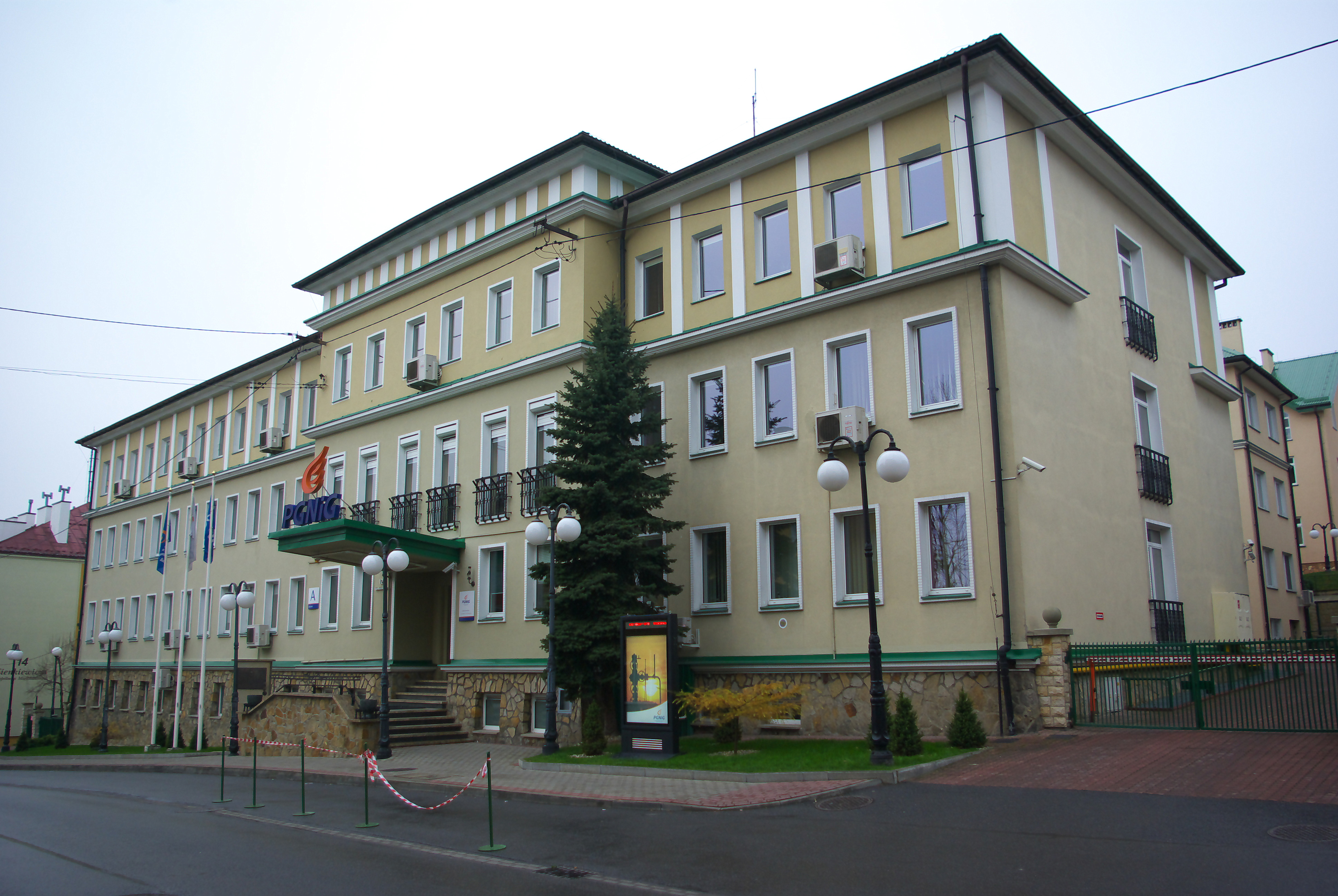 Budynek przy ulicy Sienkiewicza 12 w Sanoku, centrala oddziału PGNiG Sanok